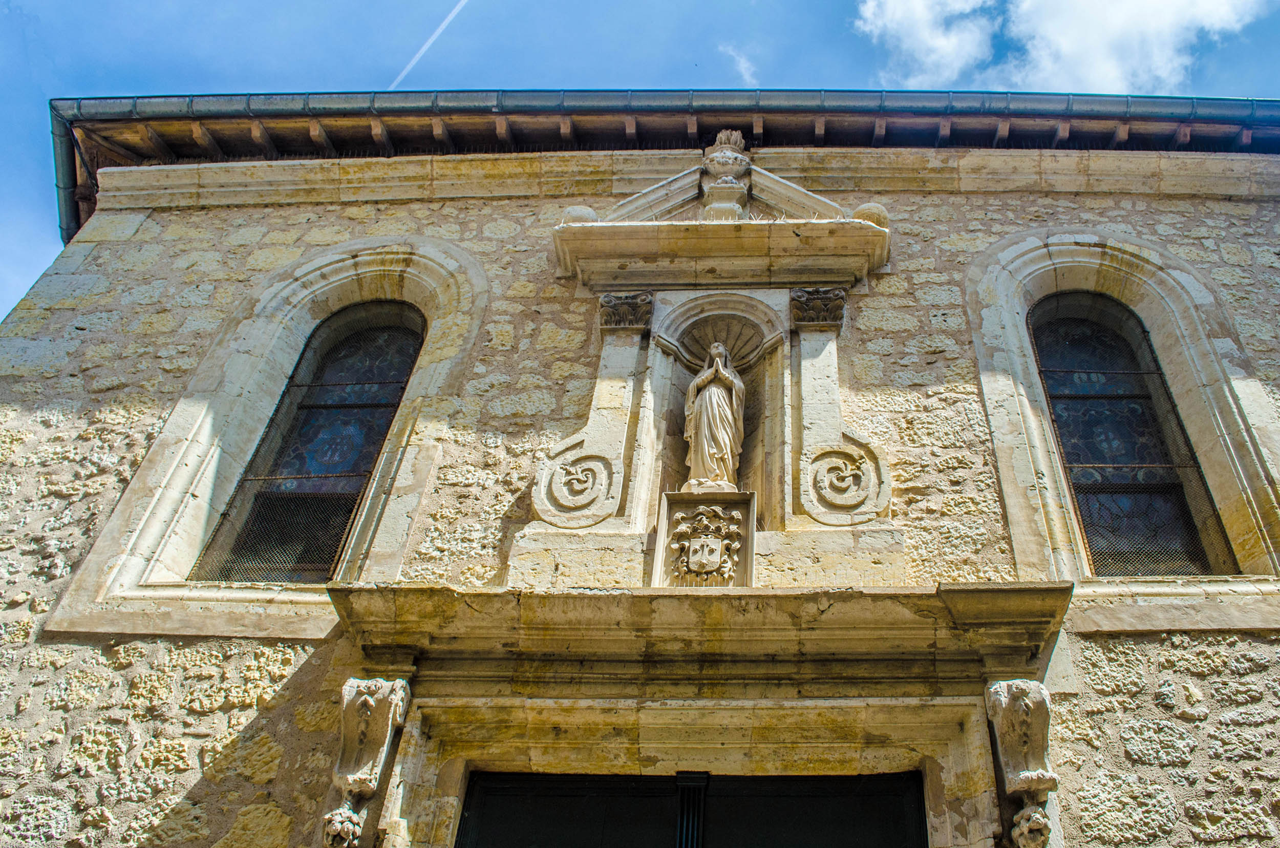 Lectoure (Gers, France), chapelle des Carmélites, XVIIe s. Portail.